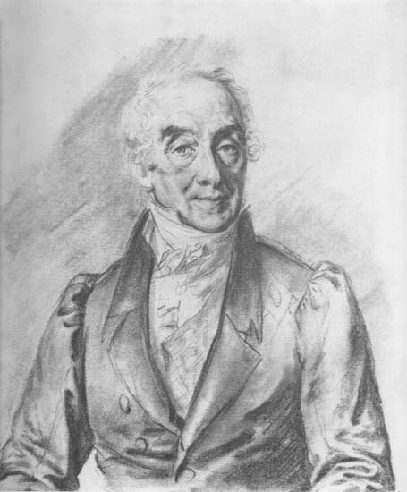 Орлов Владимир Григорьевич (граф)